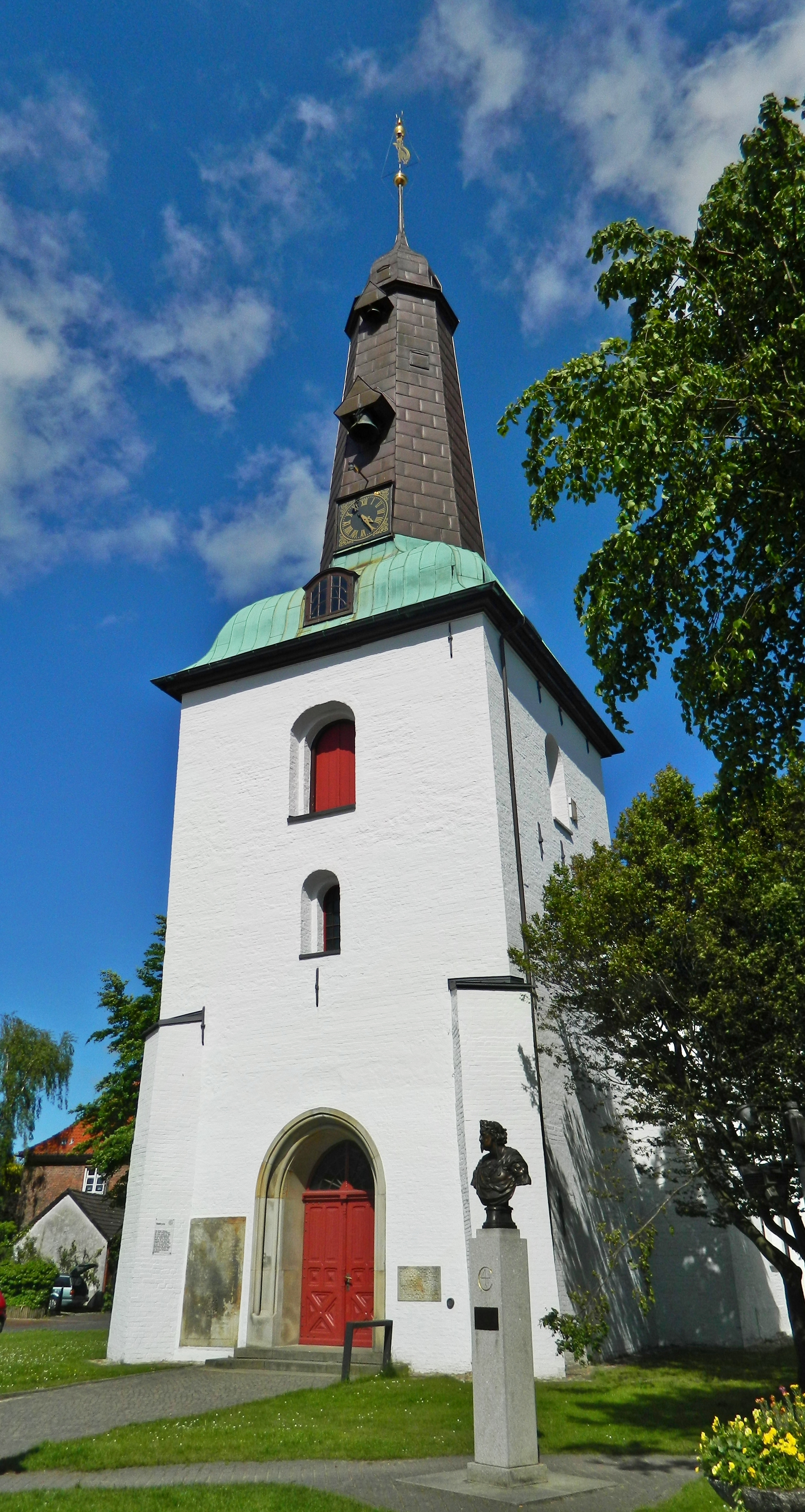 25348 Glückstadt, Germany